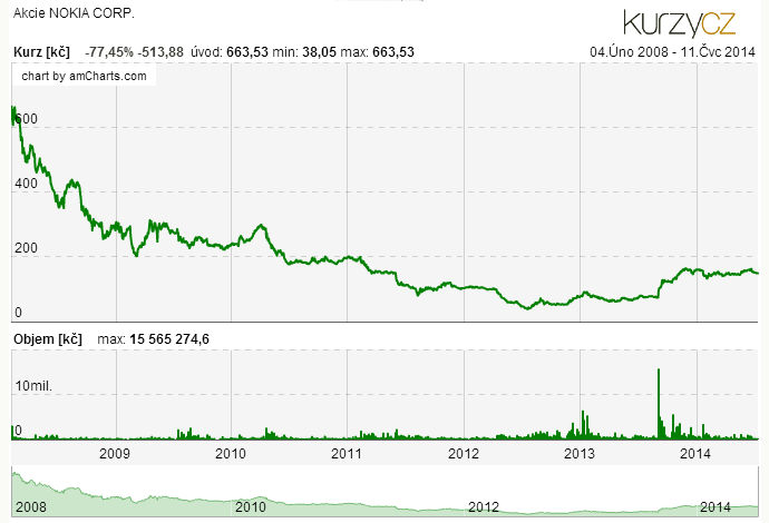 Akcie NOKIA - Graf vývoje kurzu na Burze Praha.